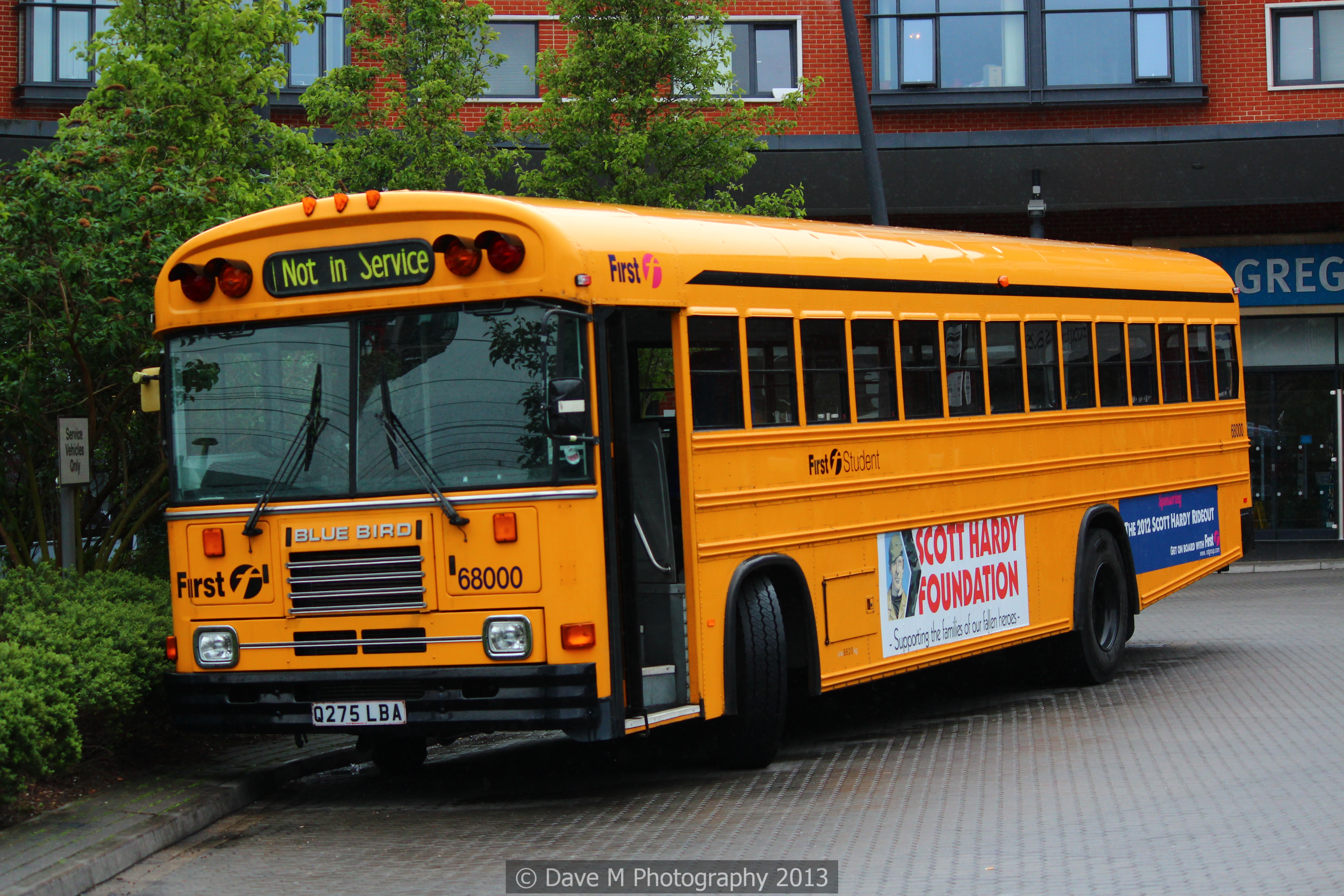 First Essex - 68000 - Q275 LBA